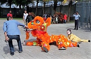 Chinesisches Neujahr in Dili, Osttimor